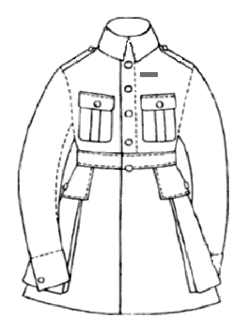 Wstążeczka amarantowa na mundurze.